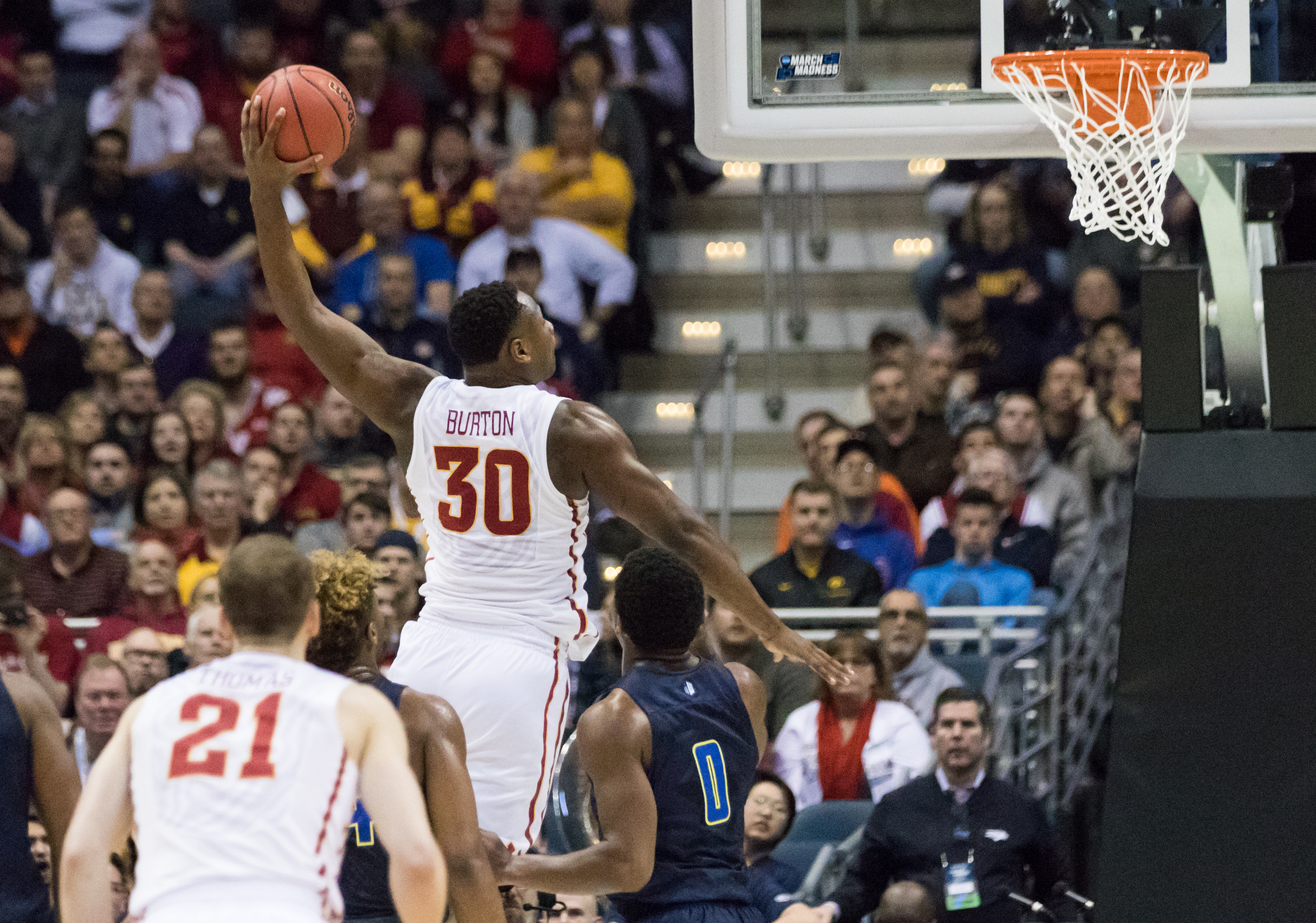 ISU vs Nevada